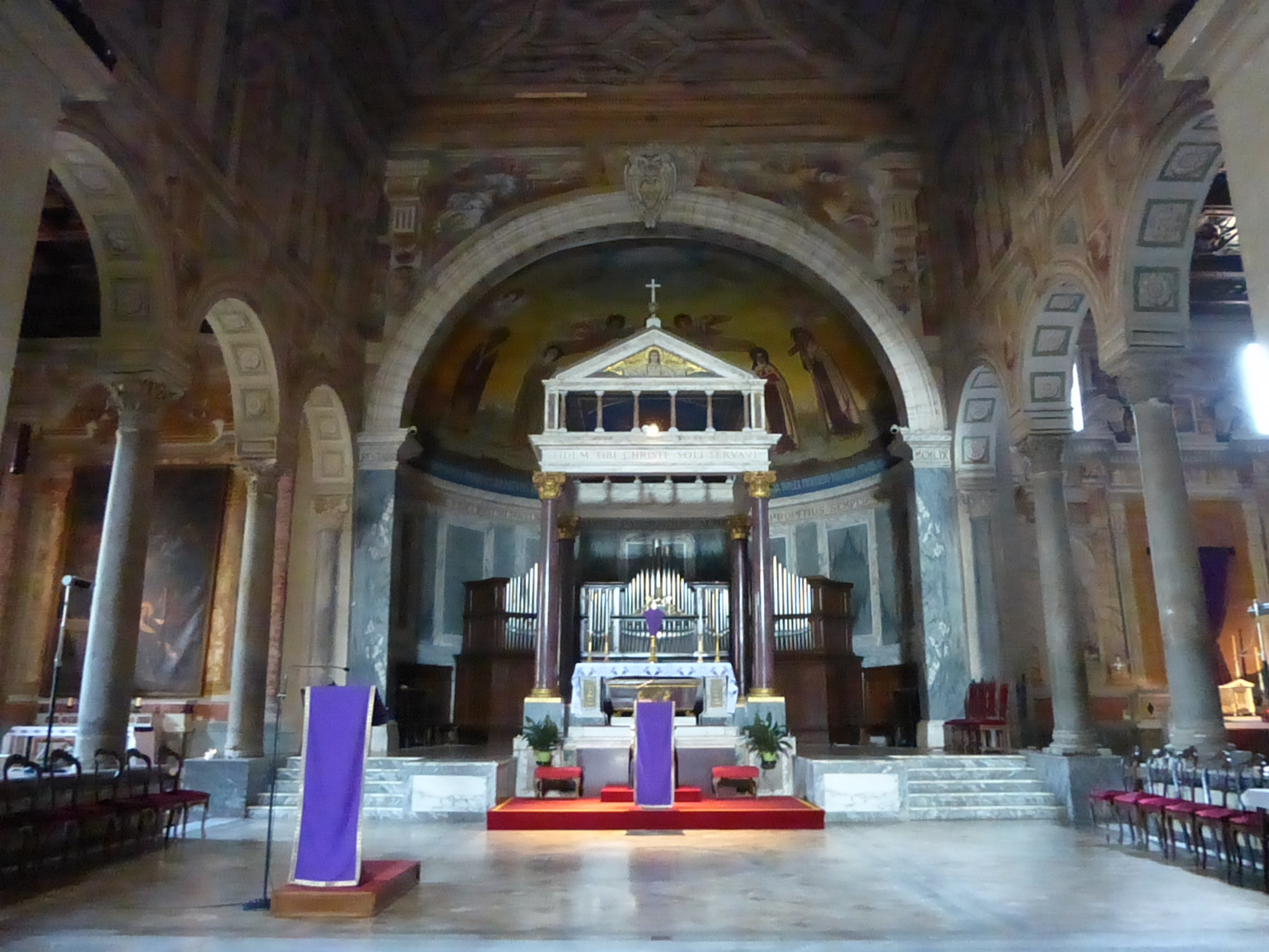 Roma, basilica di S. Pancrazio. Interno quaresimale e organo.